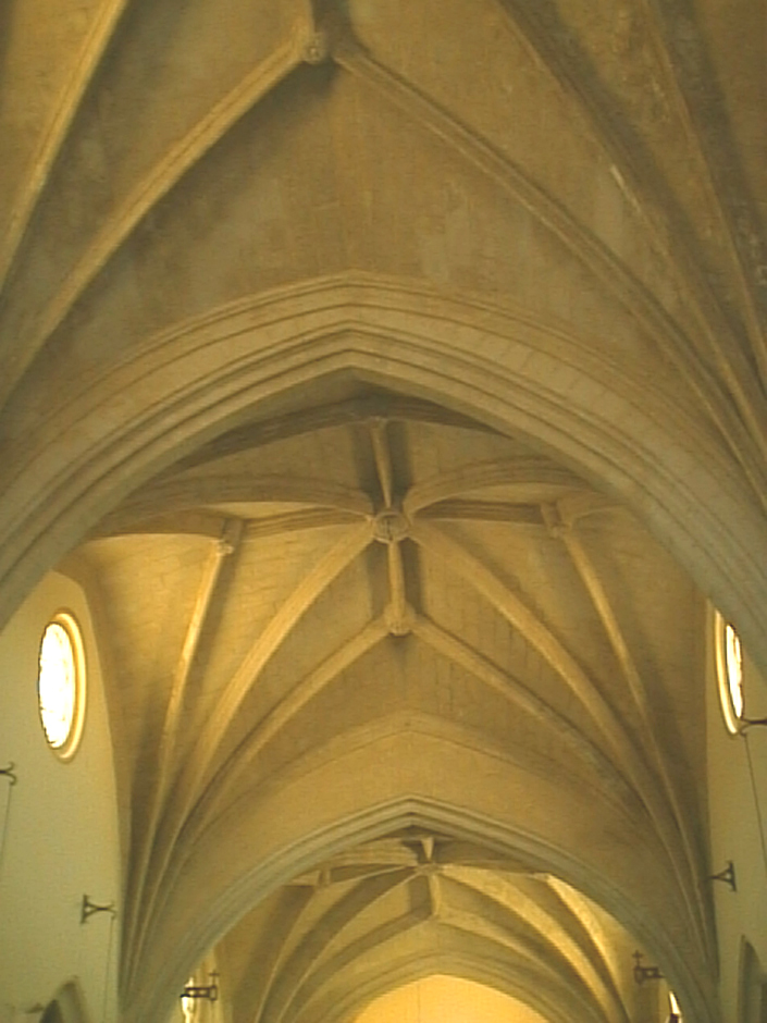 Volte a crociera, chiesa di Sant'Eulalia, Cagliari